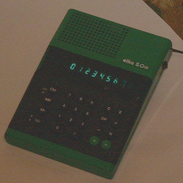 Фото калькулятора ЭЛКА 50М №1